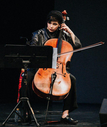 کنسرت کیهان کلهر و کوارتت مینیاتور (پدرام فریوسفی، آتنا اشتیاقی، نیلوفر محبی و میثم مروستی) با عنوان «شهر خاموش»، تالار وحدت تهران